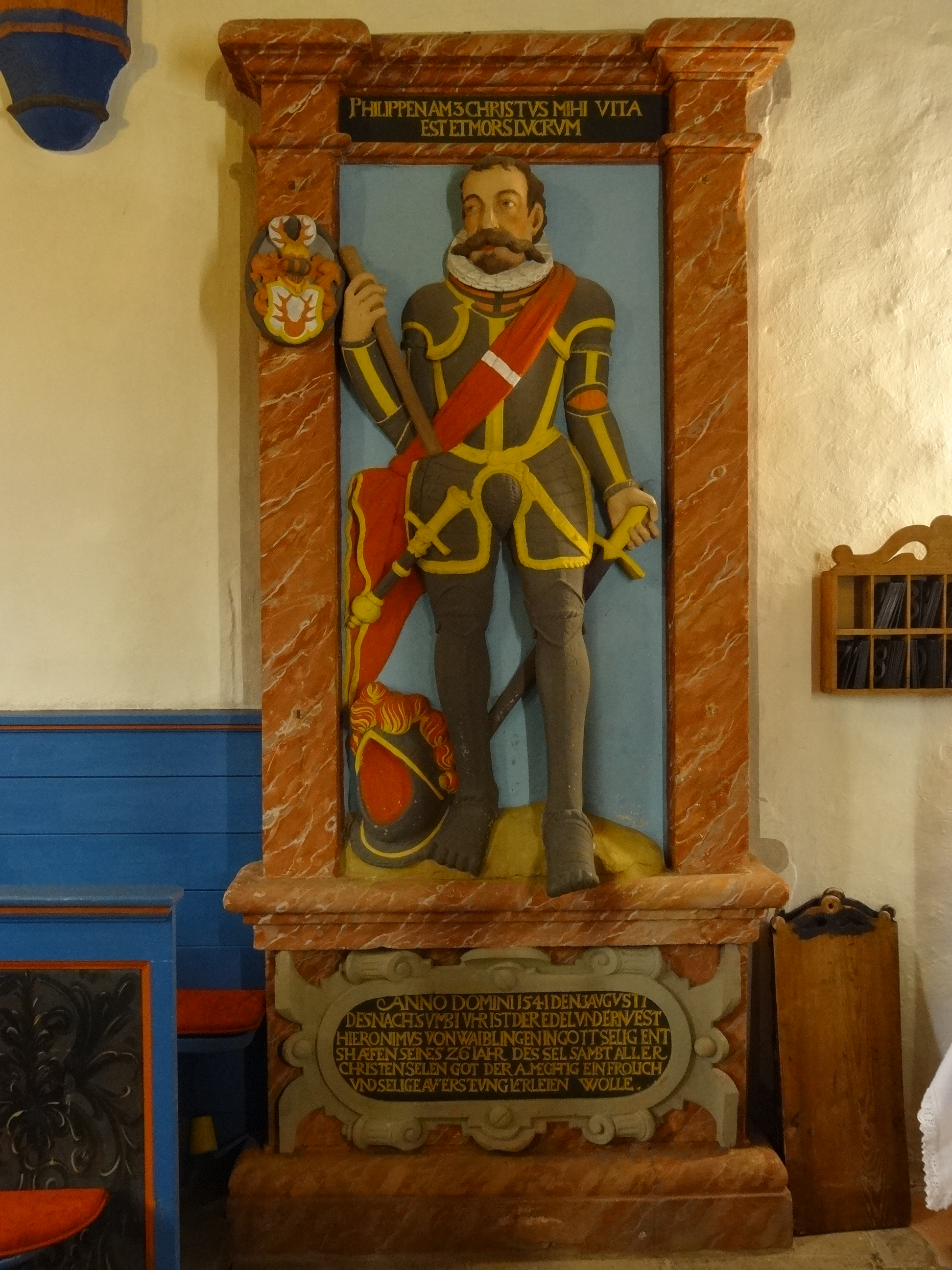 Hieronymus von Waiblingen 1541, Schwickartshausen [1]